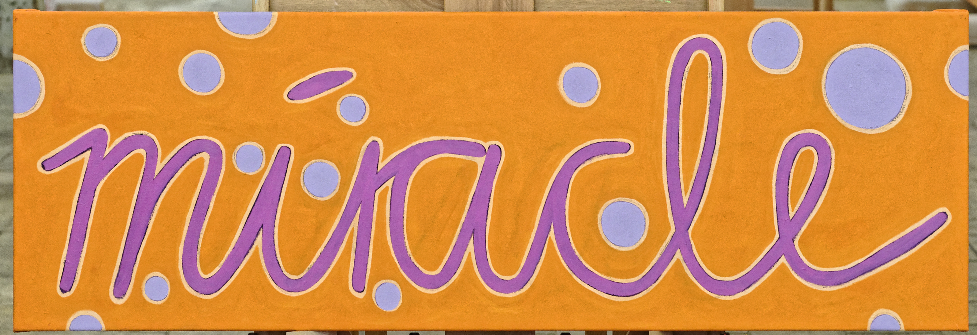 Bilder aus der Galerie von Eva Bur am Orde 2020 mit dem Schwerpunkt ornamentaler und figurativer Darstellungen.